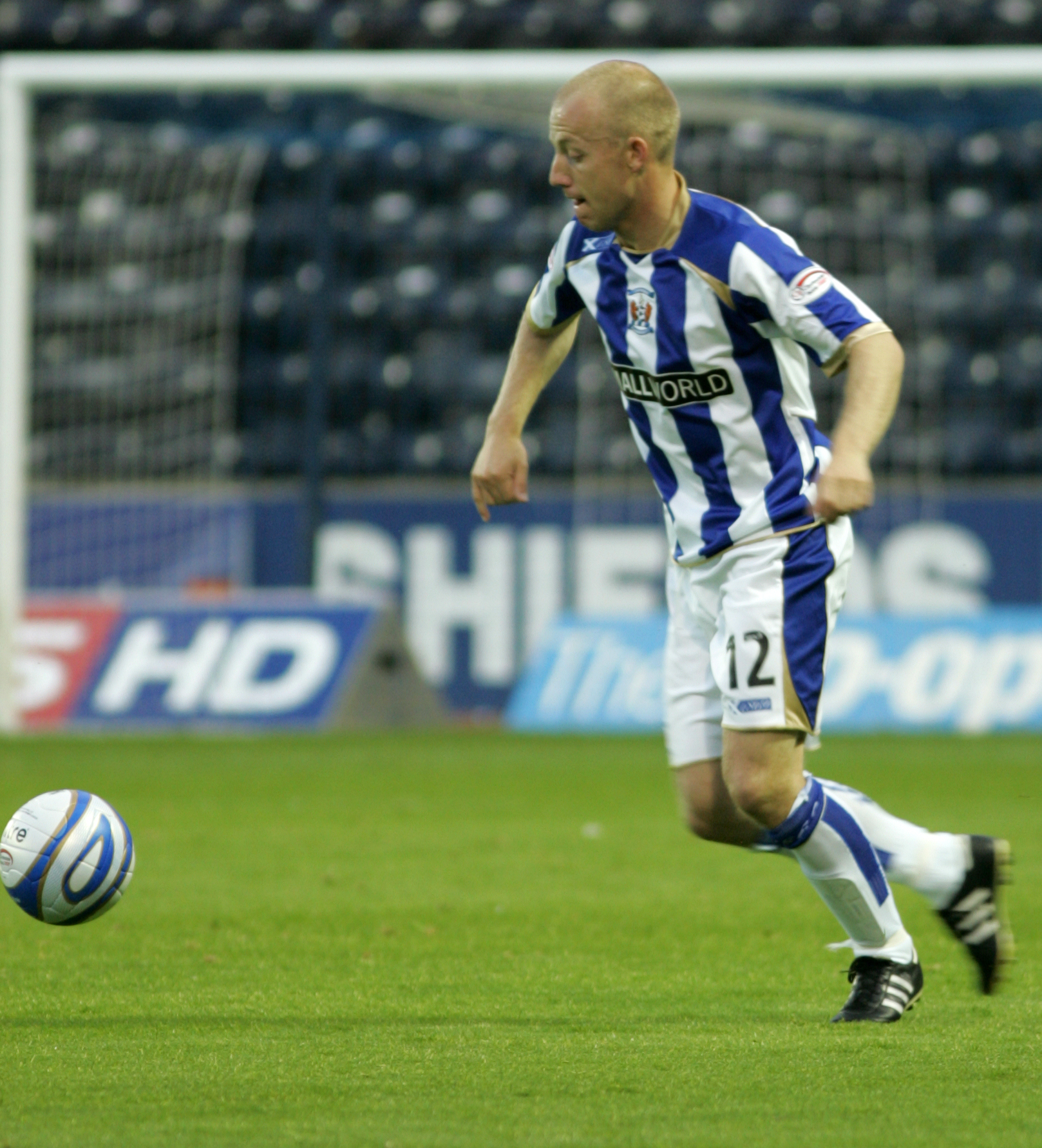 Gavin Skelton Kilmarnock vs Morton - CIS Cup 2nd Round.